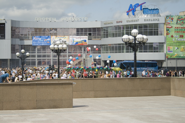 Здание «Арт-Паласа» (бывший кинотеатр «Юбилейный») по ул. Механической, 42 в Тюмени